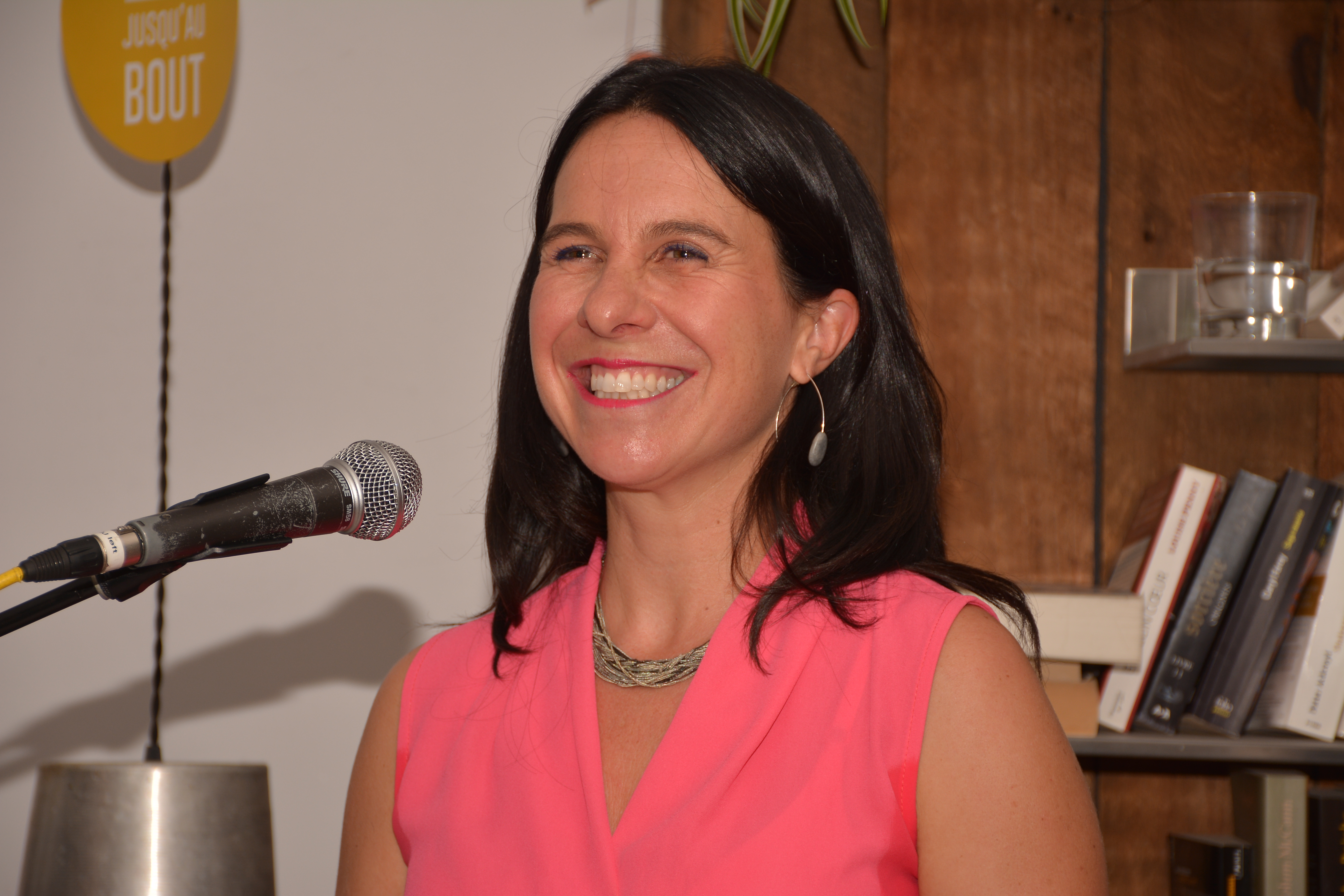 Valérie Plante lance sa campagne à la direction de Projet Montréal le 20 septembre 2016 au Café Stouf à Montréal.